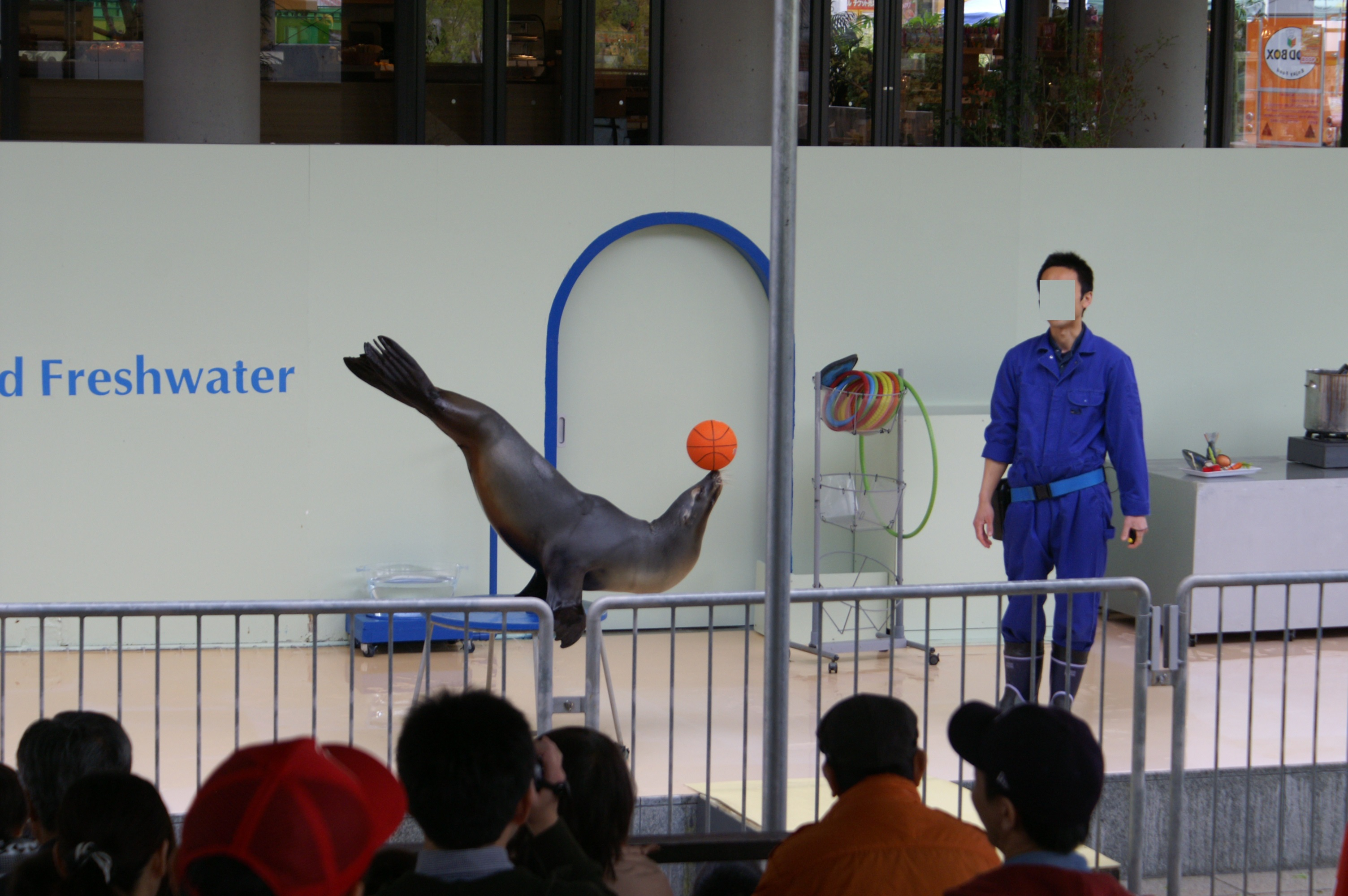 アクアととぎふでのアシカショー。